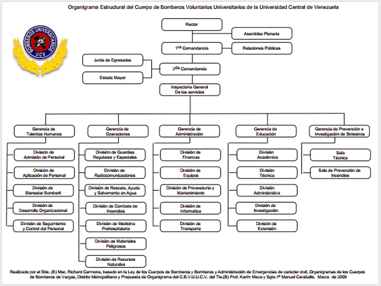 Organigrama vigente del Cuerpo de Bomberos Voluntarios Universitarios de la Universidad Central de Venezuela